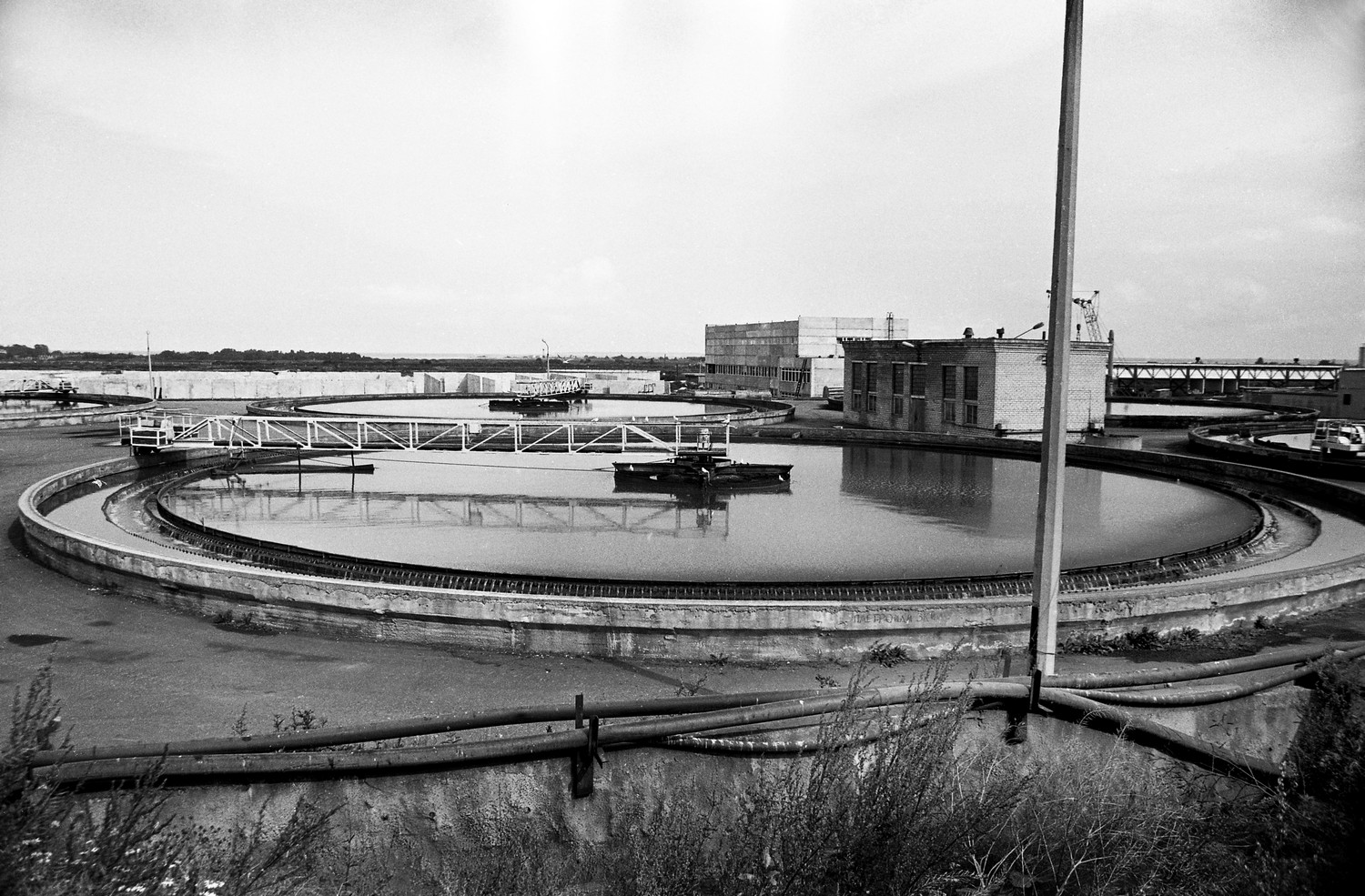 Paljassaare reoveepuhastusjaam 87 (21)